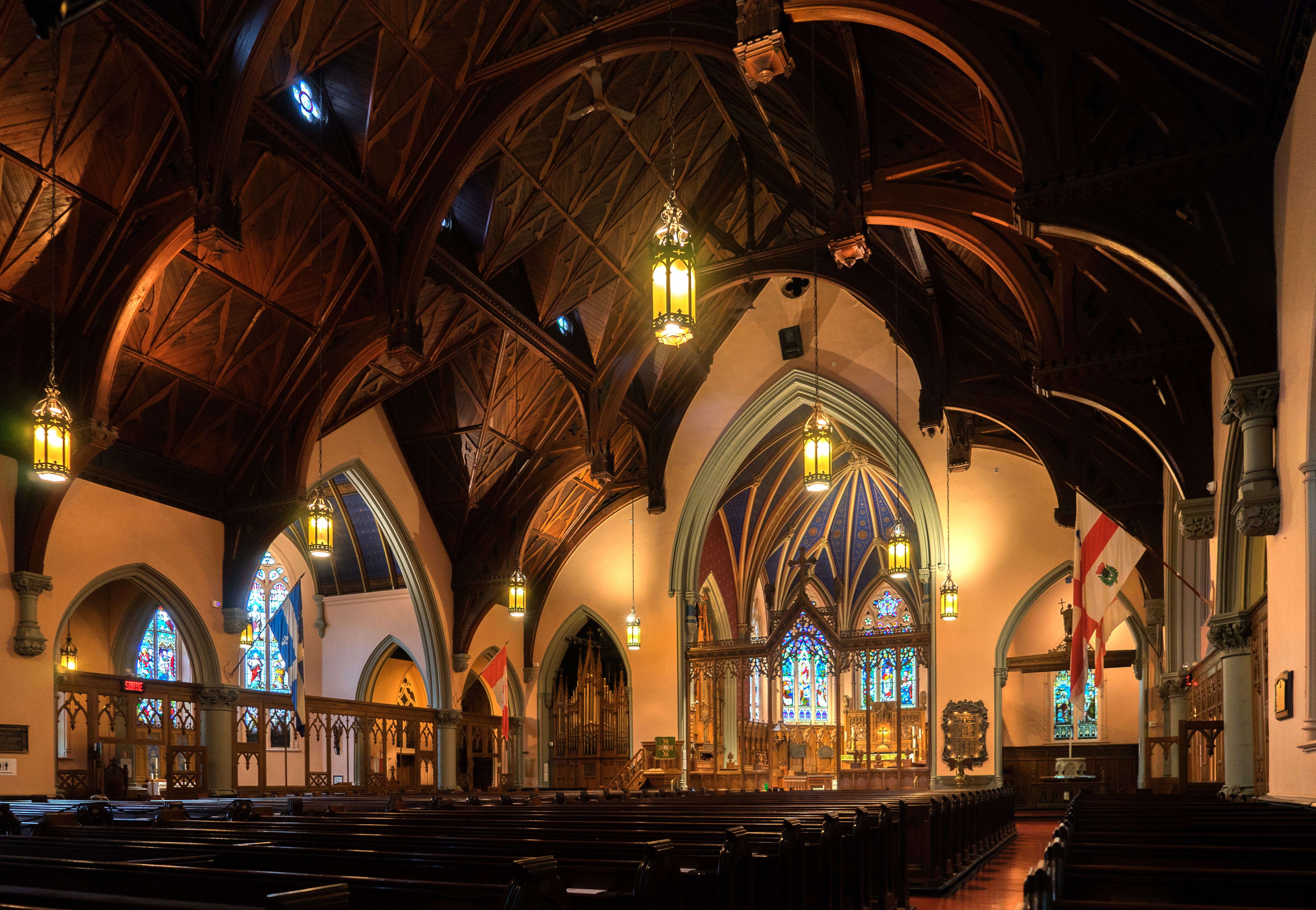 Saint George Church, interior, Montreal